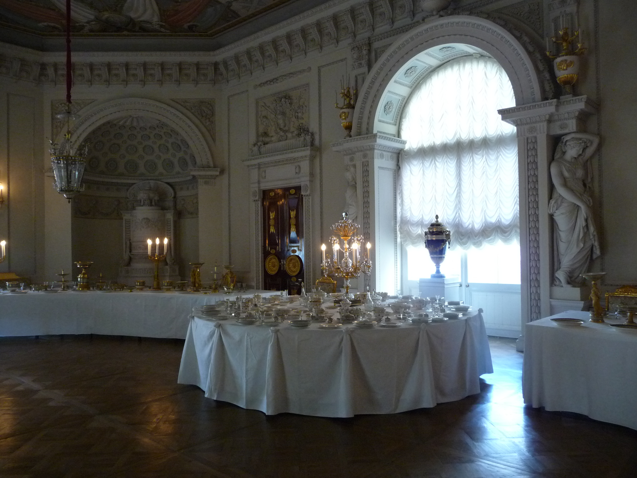 Palace-p1030780.jpg